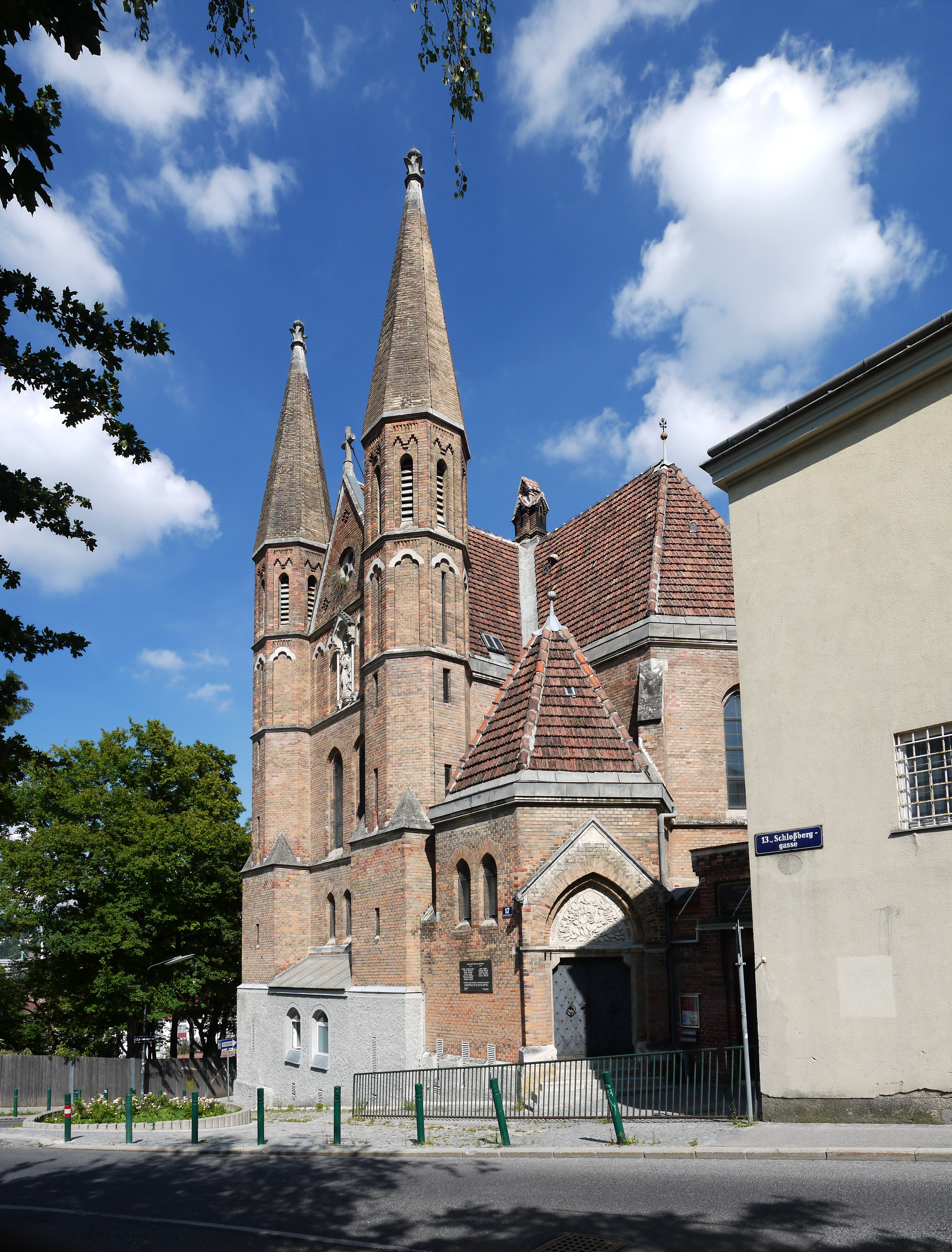 Dominikanerinnenkonvent